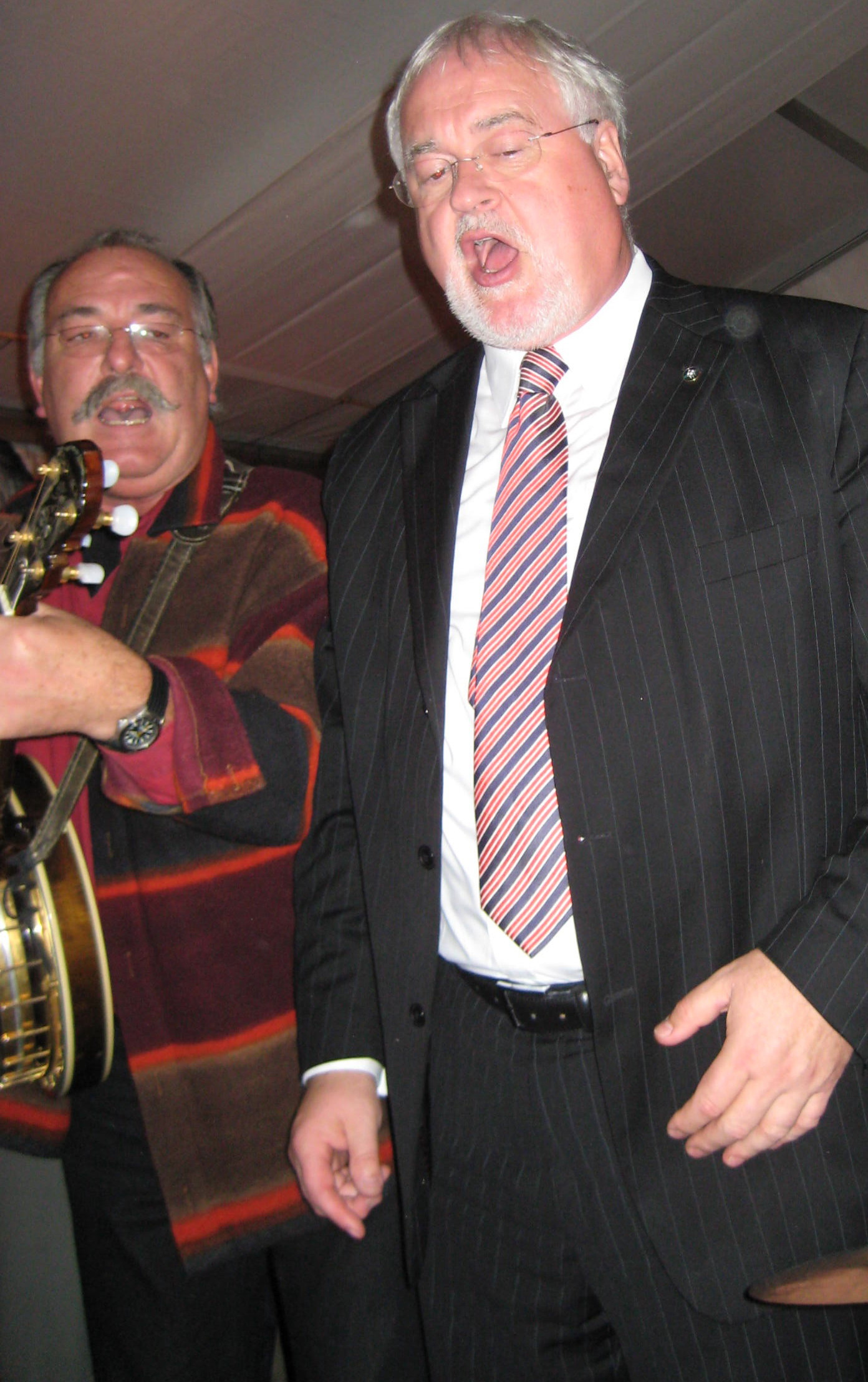 Peter Harry Carstensen singt mit Joachim Hinz von Timmerhorst am 3. Oktober 2008 im Festzelt des Freistaats Sachsen anlässlich der Feiern zum Tag der Deutschen Einheit in Hamburg, Speicherstadt